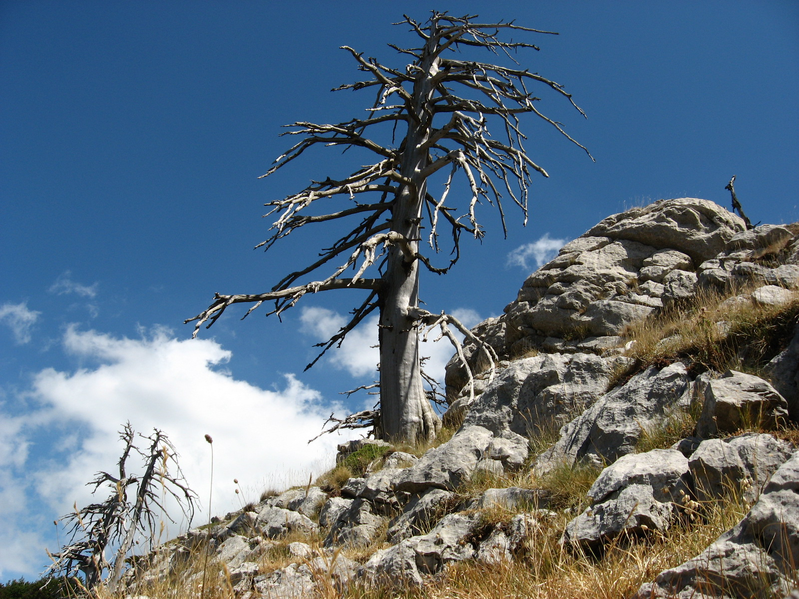 Scheletro di Pino loricato Pinus heldreichii (Serra delle Ciavole).